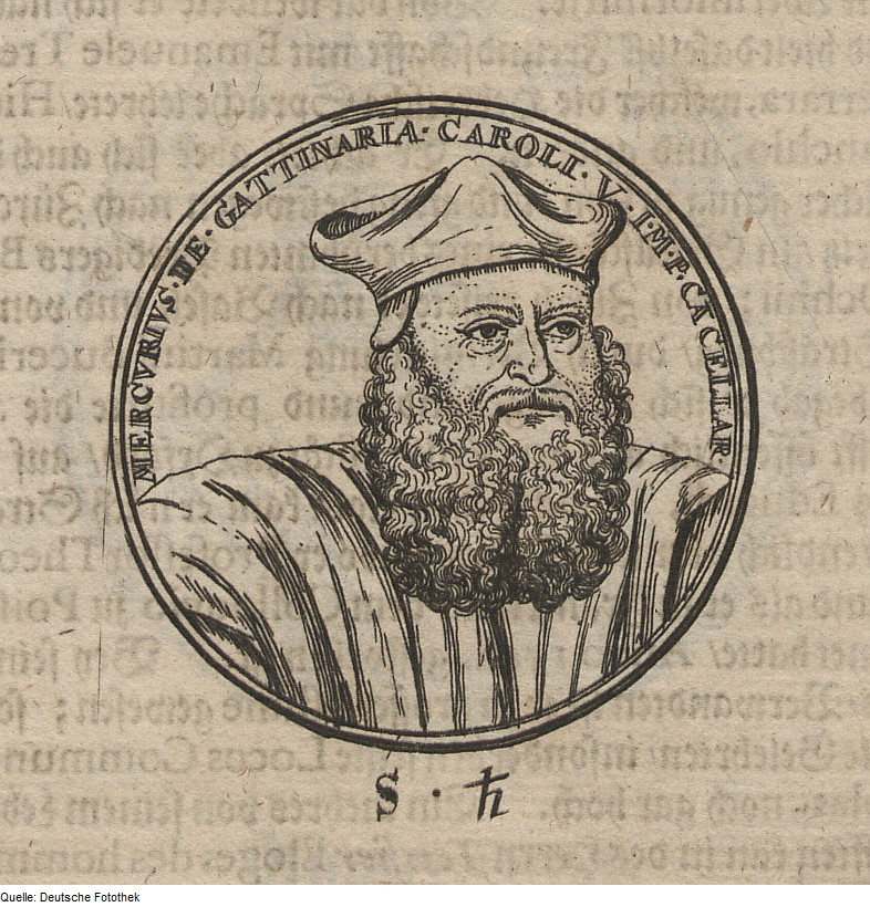 Original image description from the Deutsche Fotothek Münze & Gedenkmünze & Schaumünze & Medaille & Großkanzler